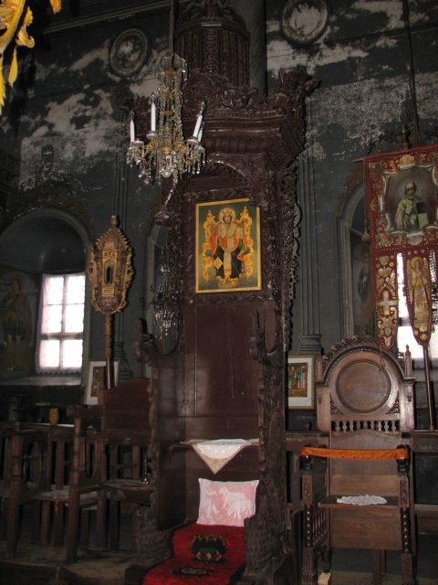 Храм Свети Николай - владишкия престол